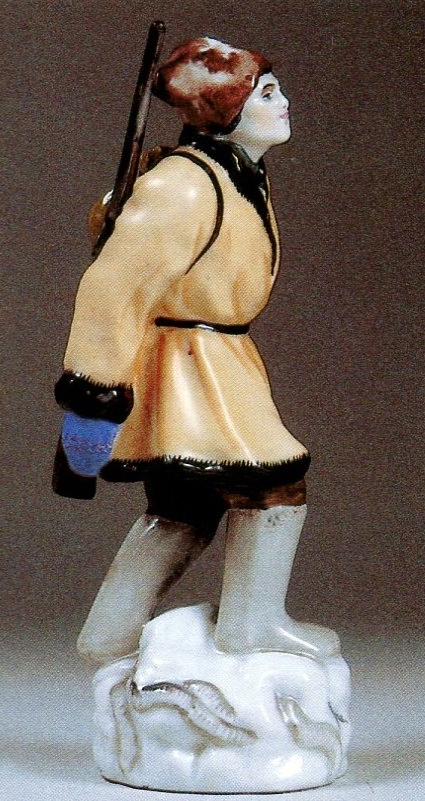 Porzellanskulptur von Natalja Danko Partisan auf dem Marsch